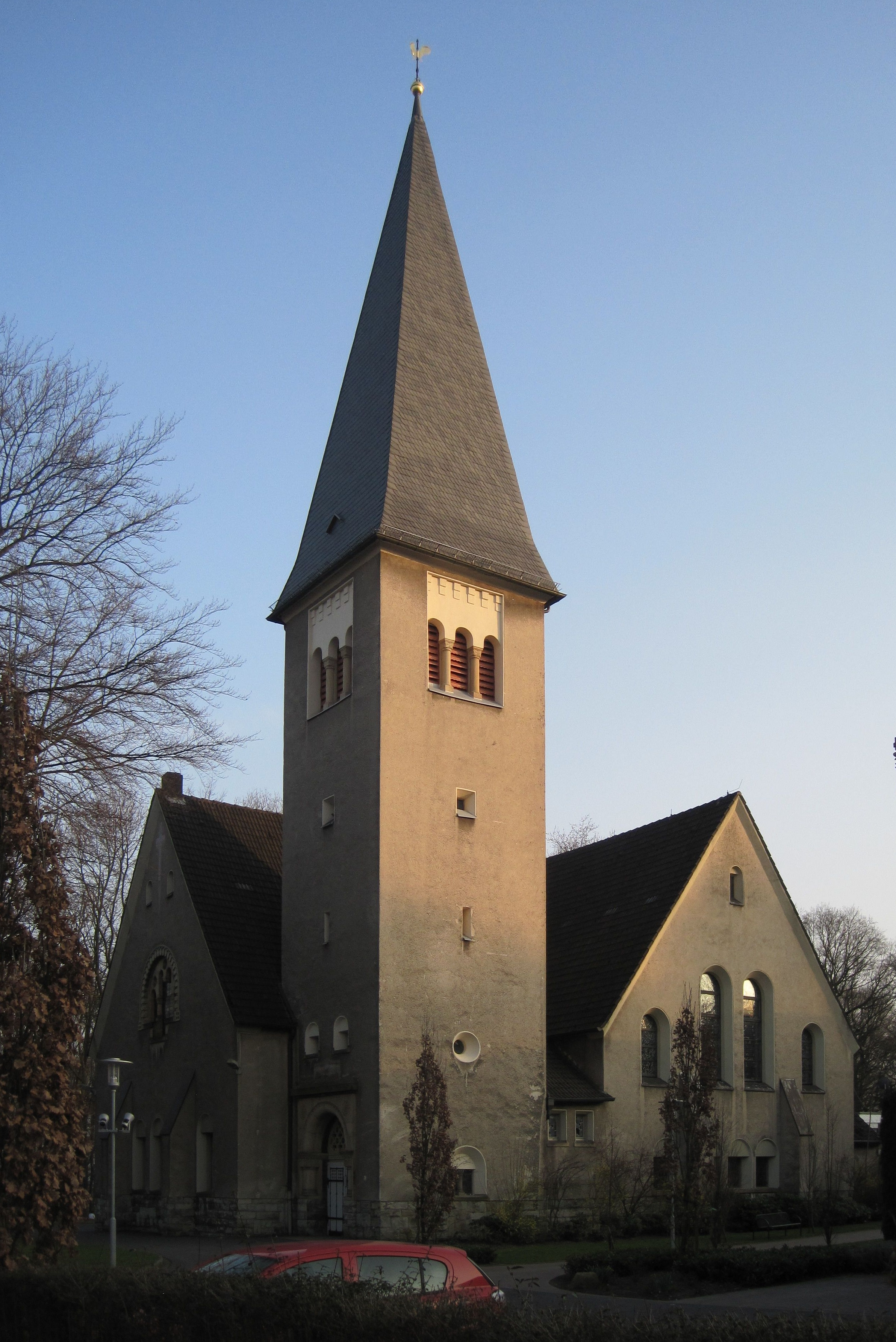 Das Foto zeigt die Kreuzkirche in Hamm-Bockum-Hövel.